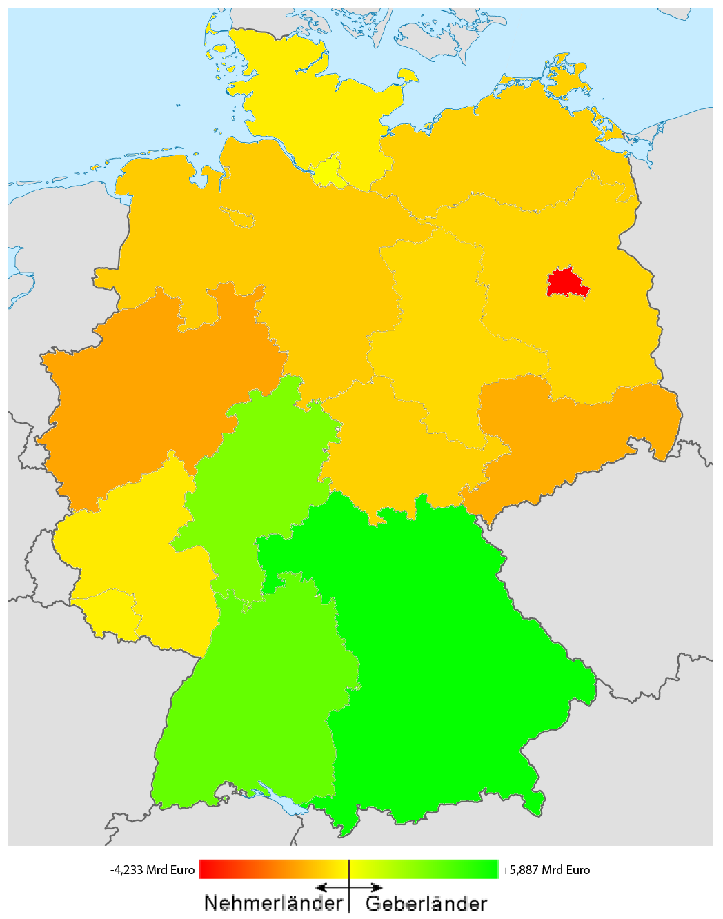 Länderfinanzausgleich: Pro-Kopf-Transfer der einzelnen Bundesländer (Stand 2017). Datenbasis: .